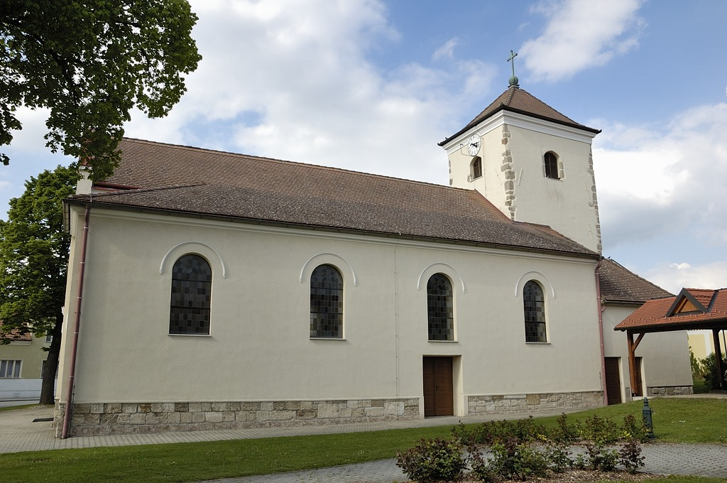 Kath. Pfarrkirche hl. Pankraz